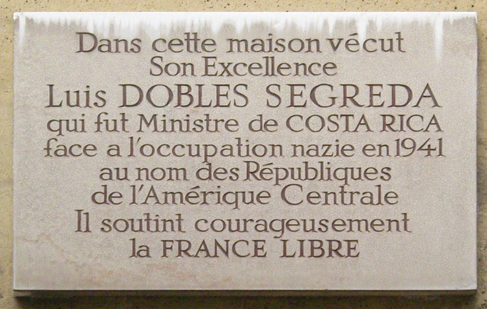 Plaque commémorative, 12 square Henry-Paté, Paris 16e. « Dans cette maison vécut Son Excellence Luís Dobles Segreda, qui fut ministre de Costa Rica face à l'occupation nazie en 1941 au nom des républiques de l'Amérique centrale. Il soutint courageusement la France Libre »